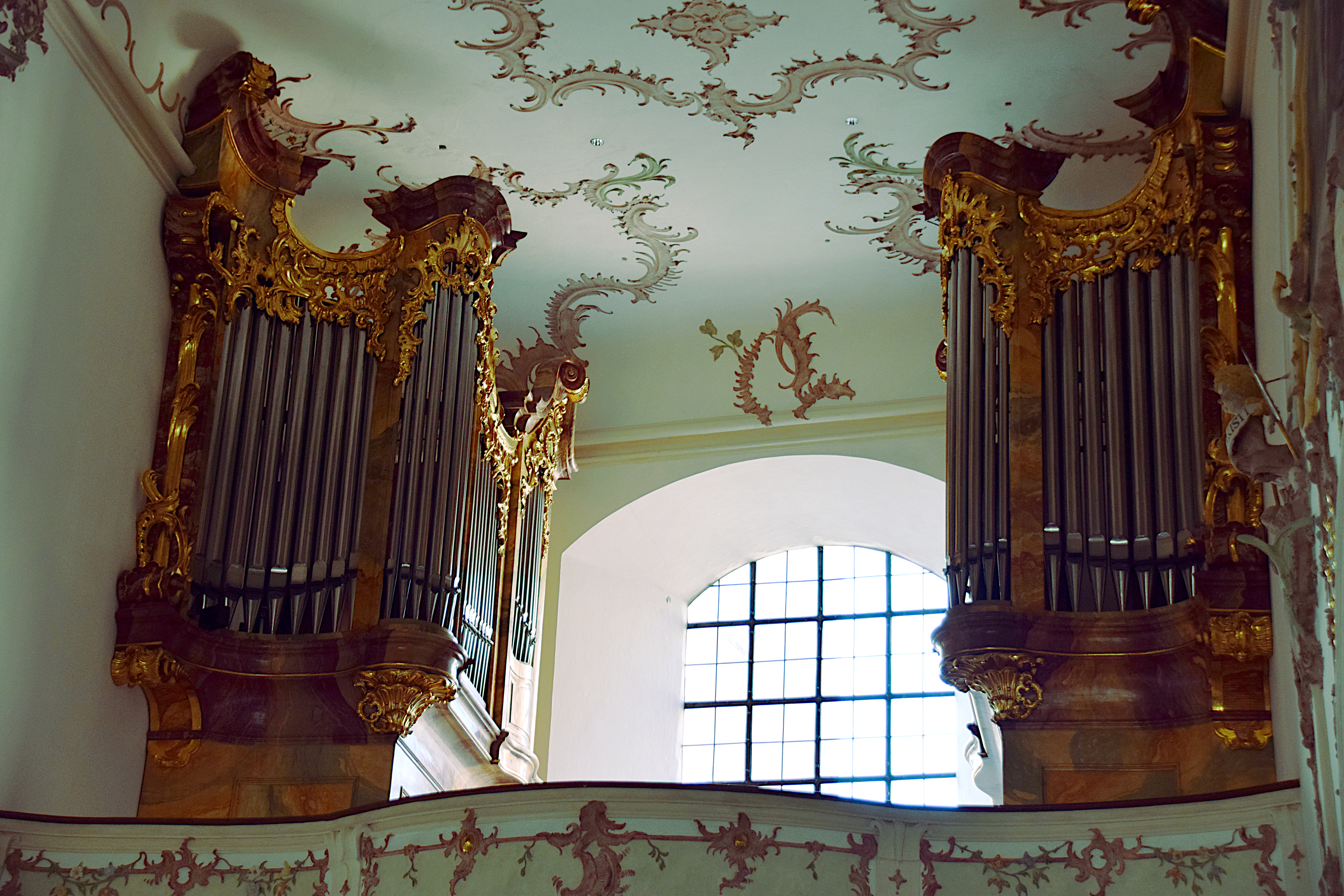 Orgel der Stiftspfarrkirche St. Kassian in Regensburg